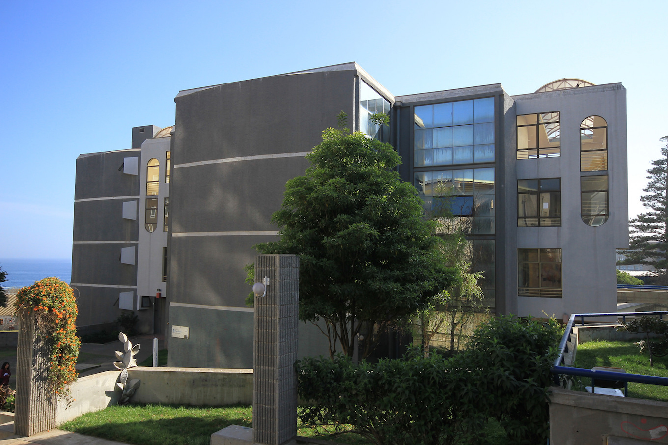 Artes UPLA